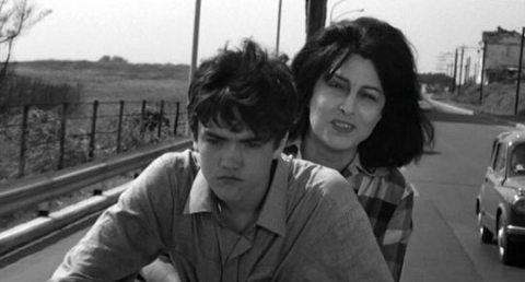 Screenshot from Mamma Roma directed by Pier Paolo Pasolini